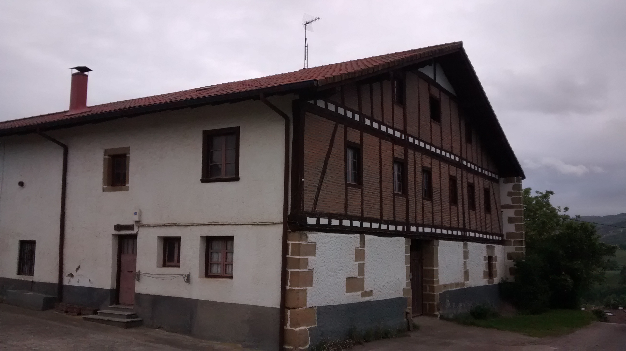 Berridi baserria. Zubieta (Gipuzkoa). 2006an Eusko Jaurlaritzak monumentu izendatu zuen.